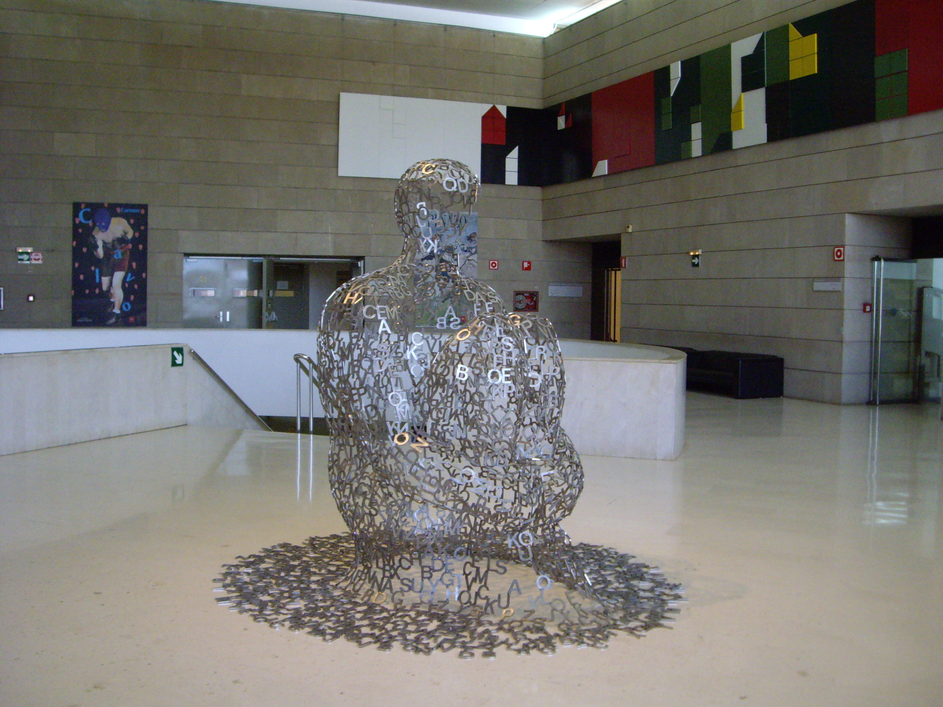 Interior de l'IVAM durant una exposició de Jaume Plensa